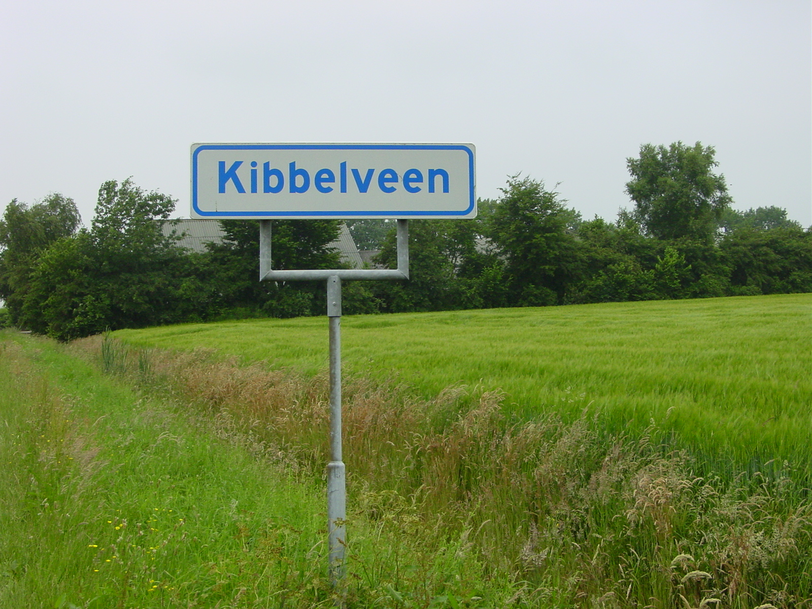 Kibbelveen in The Netherlands